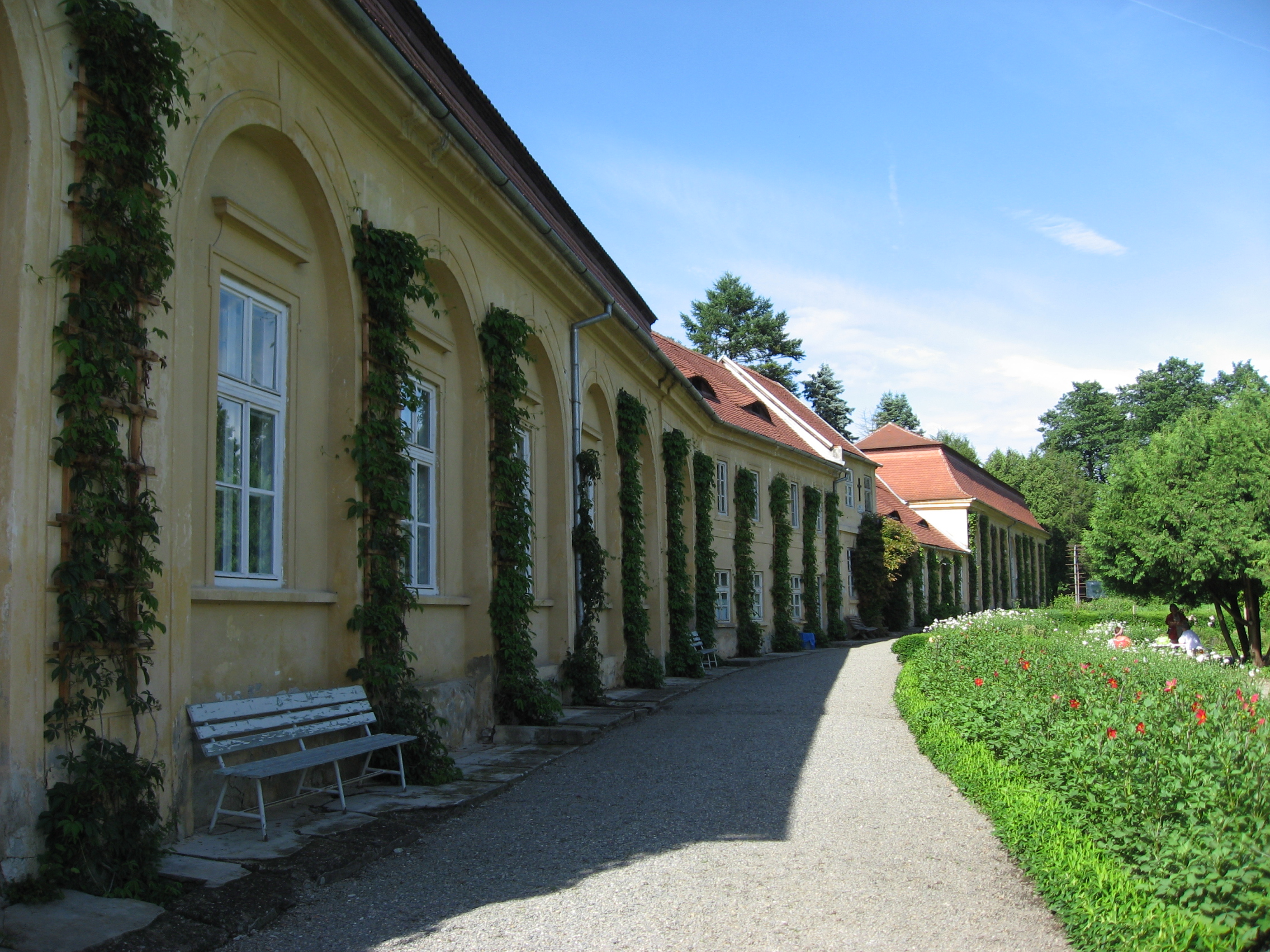 Brukenthal'sche Sommerresidenz in Freck / Avrig, Orangerie 01